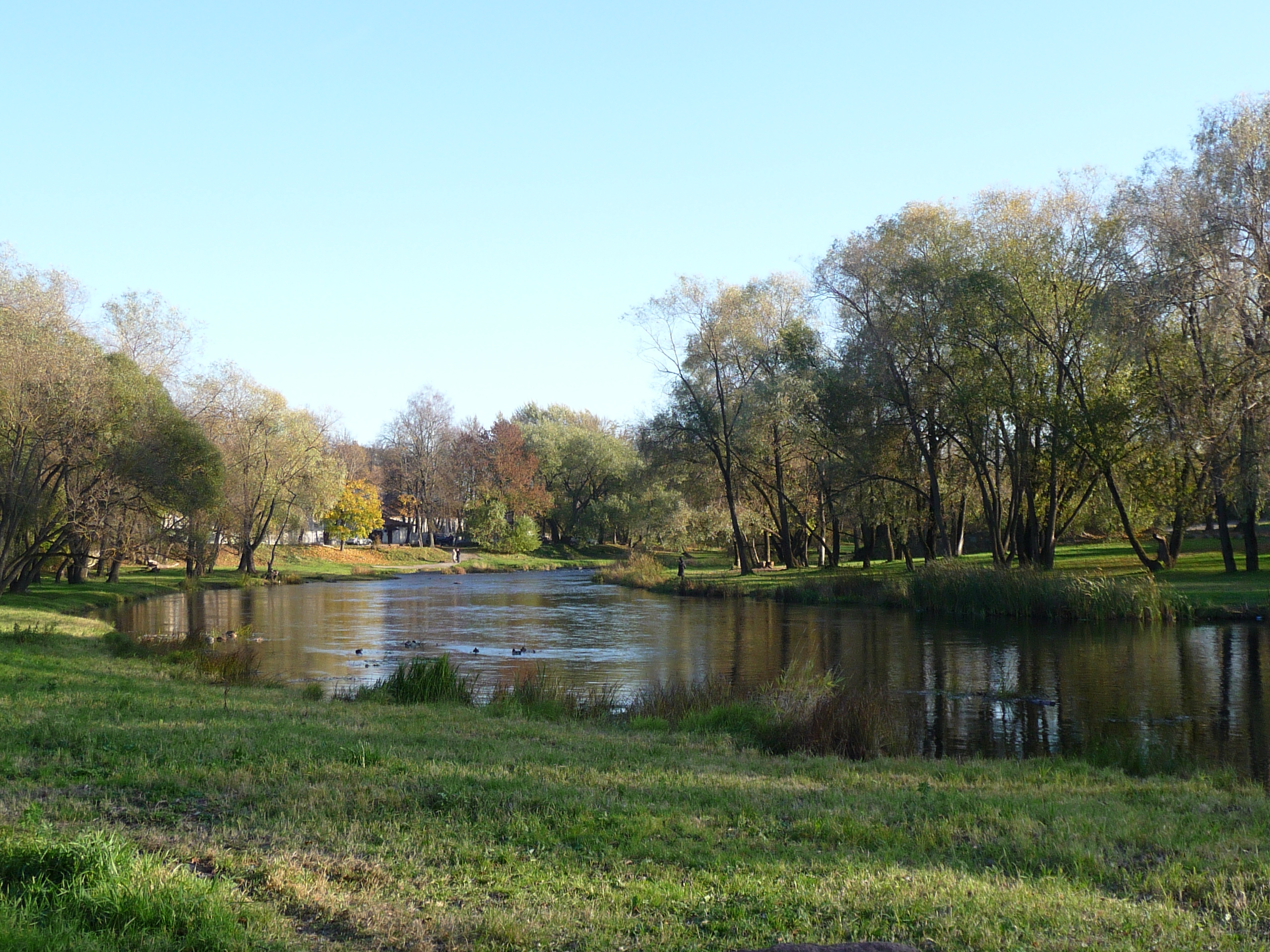 Река Пскова близ парка Куопио